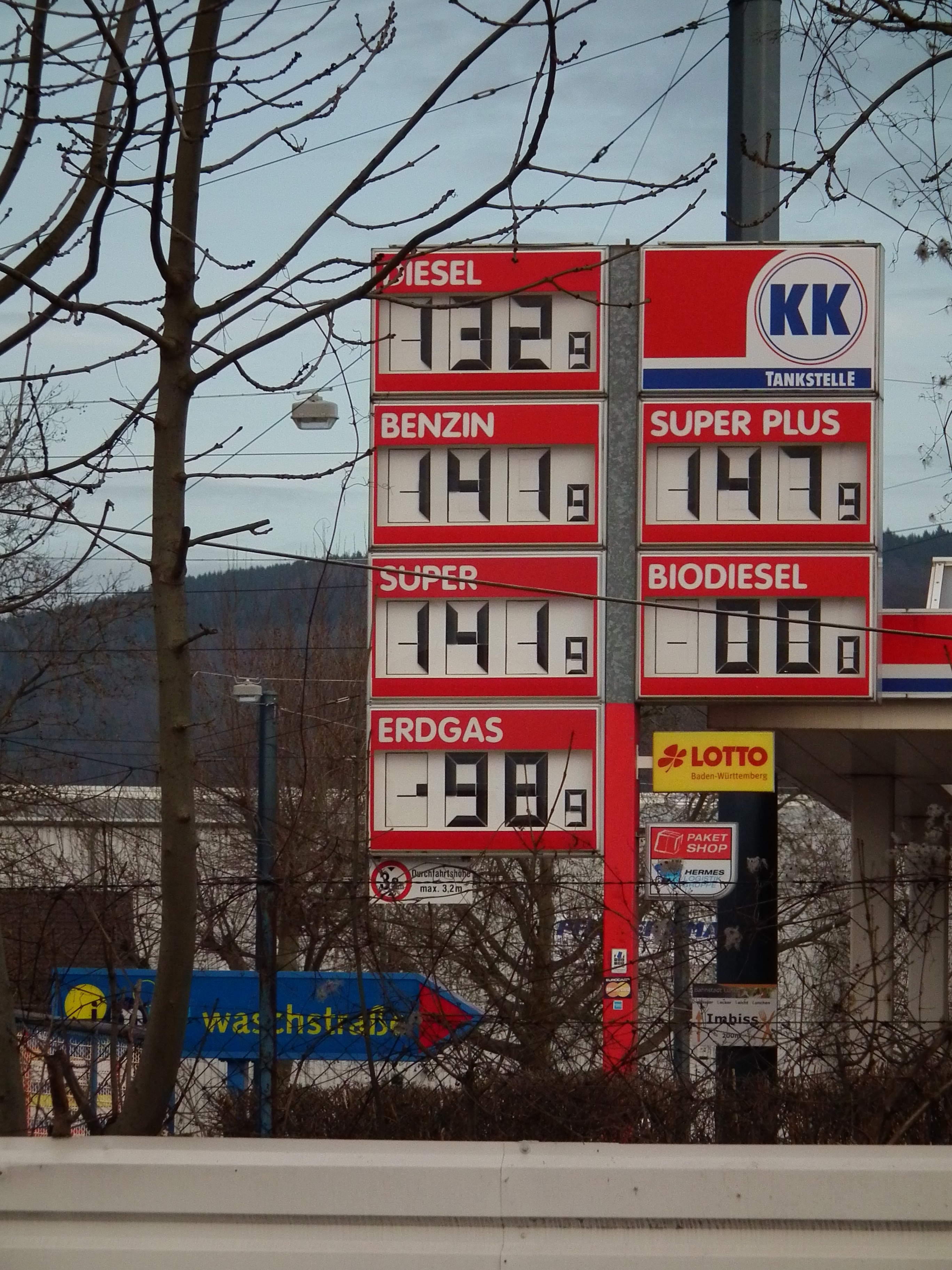 Preisanzeige einer Tankstelle im Heidelberger Stadtteil Bahnstadt (Baden-Württemberg, Deutschland)